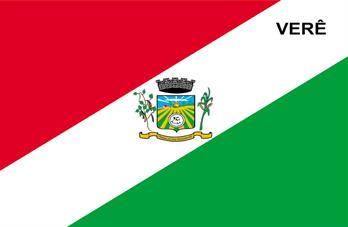 Bandeira do município de Verê, Paraná, Brasil.